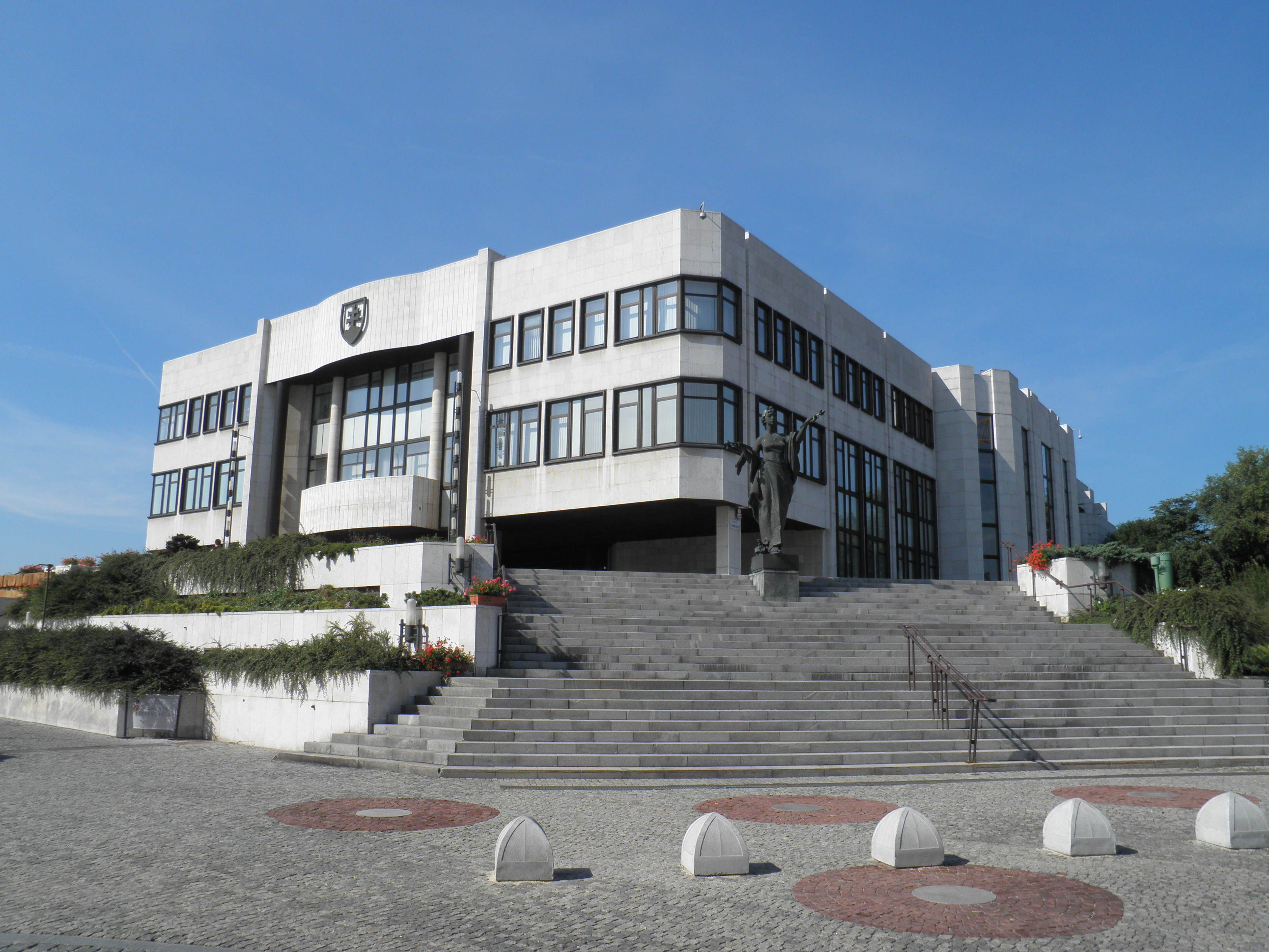 Nacionalni savet Slovačke republike